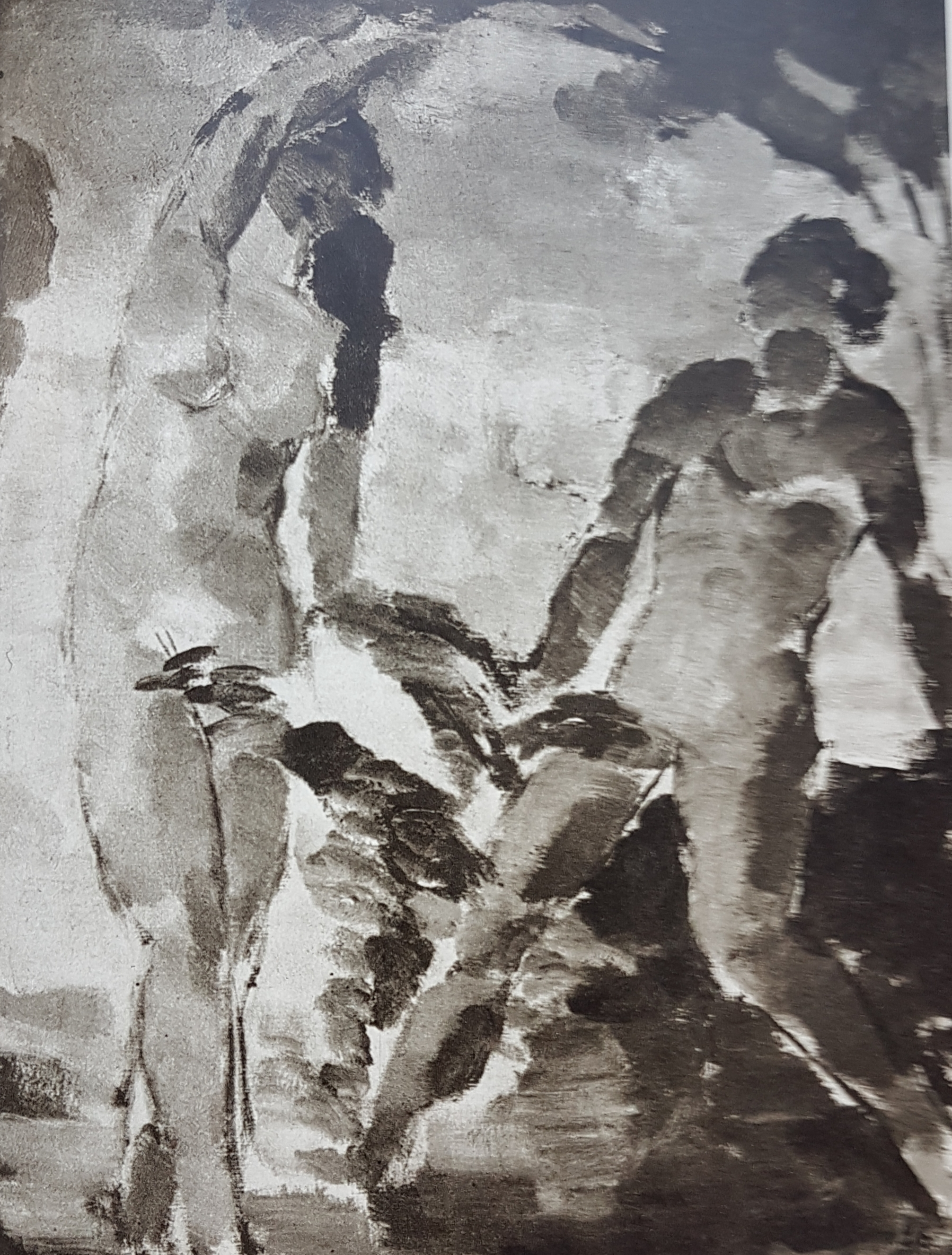 Adam och Eva målad av Albert Hoffsten, avfotograferad bild från Allhems Svenskt konstnärslexikon.